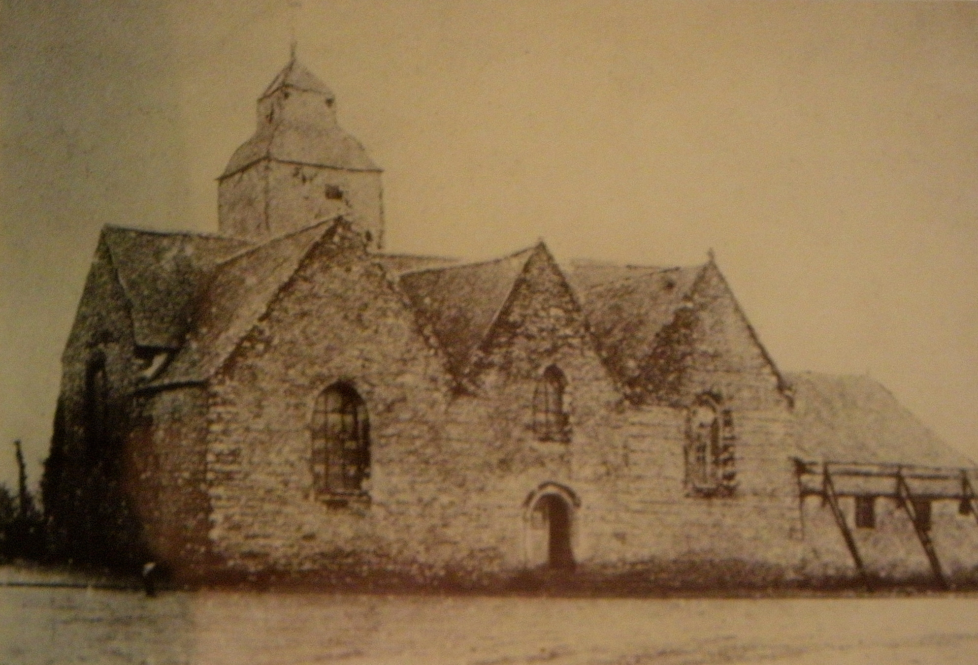 L'ancienne église de Maxent (35), avant 1893.